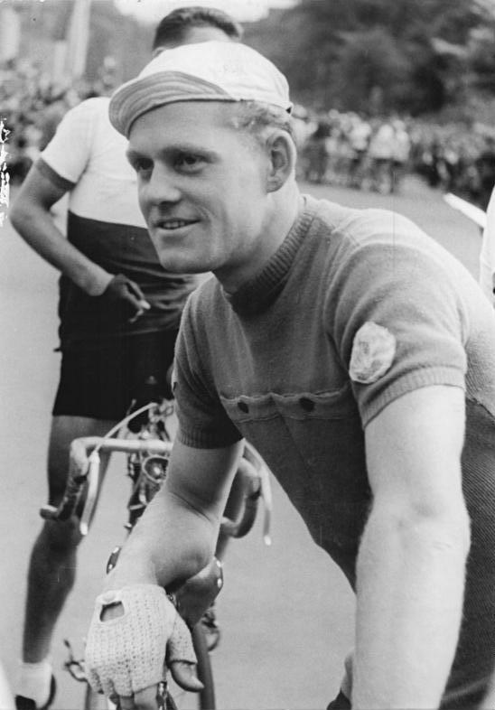 Gustav-Adolf "Täve" Schur Zentralbild Schlegel 30.6.1956 Malitz siegte beim Schloßteichrennen Am Donnerstag, den 28.6.1956 , fand in Karl-Marx-Stadt das Schloßteichrennen 1956 statt. Sieger wurde Werner Malitz (Einheit Berlin), der die gesamte Spitzenklasse der DDR hinter sich lassen konnte. Der Verdiente Meister des Sports Gustav Adolf Schur musste sich mit dem neunten Platz zufrieden geben. UBz: Gustav Adolf Schur (SC Wissenschaft DHfK Leipzig) vor dem Start.